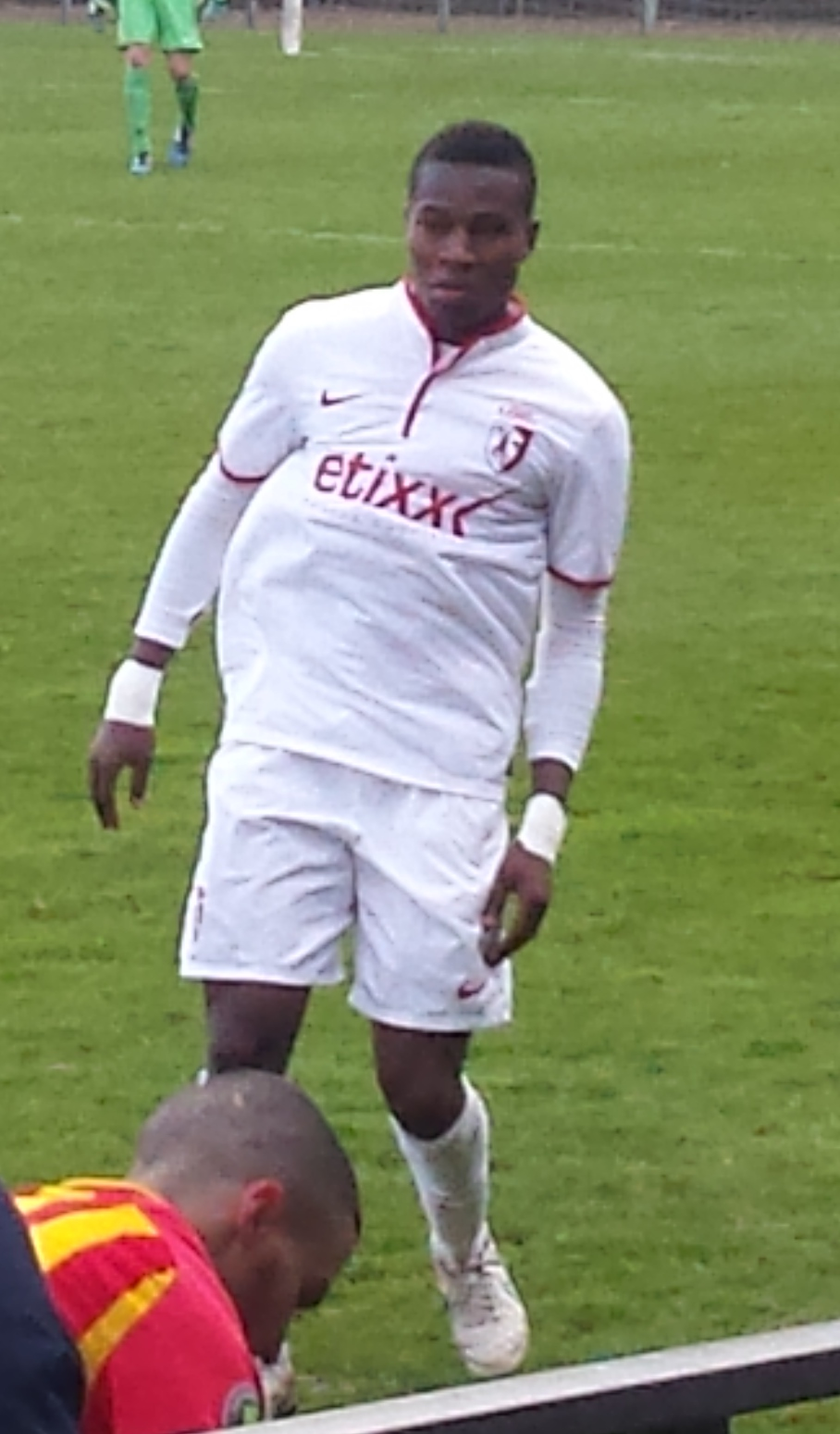 Youssouf Koné lors du match RC Lens B / Lille OSC B, comptant pour la vingt-quatrième journée du championnat de CFA (quatrième division française), le 4 avril 2015 au Stade François-Blin d'Avion.